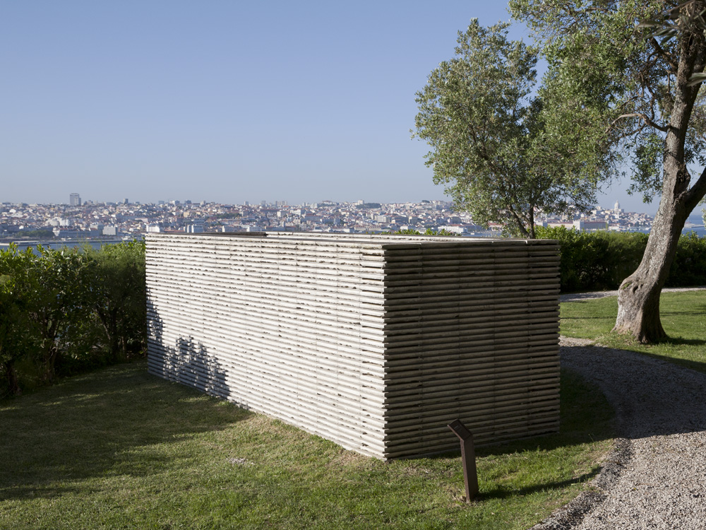 Carlos Nogueira, Mais longe e límpido ao longo, aço inox, vidro, mosaico hidráulico, 451 x 150 x 143 cm